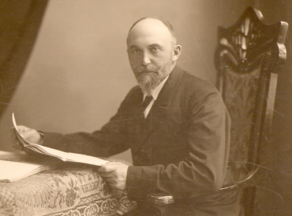 Aufnahme von Hoffotograph Franz Steenbock Rostock 1908 (Scan vom Original)